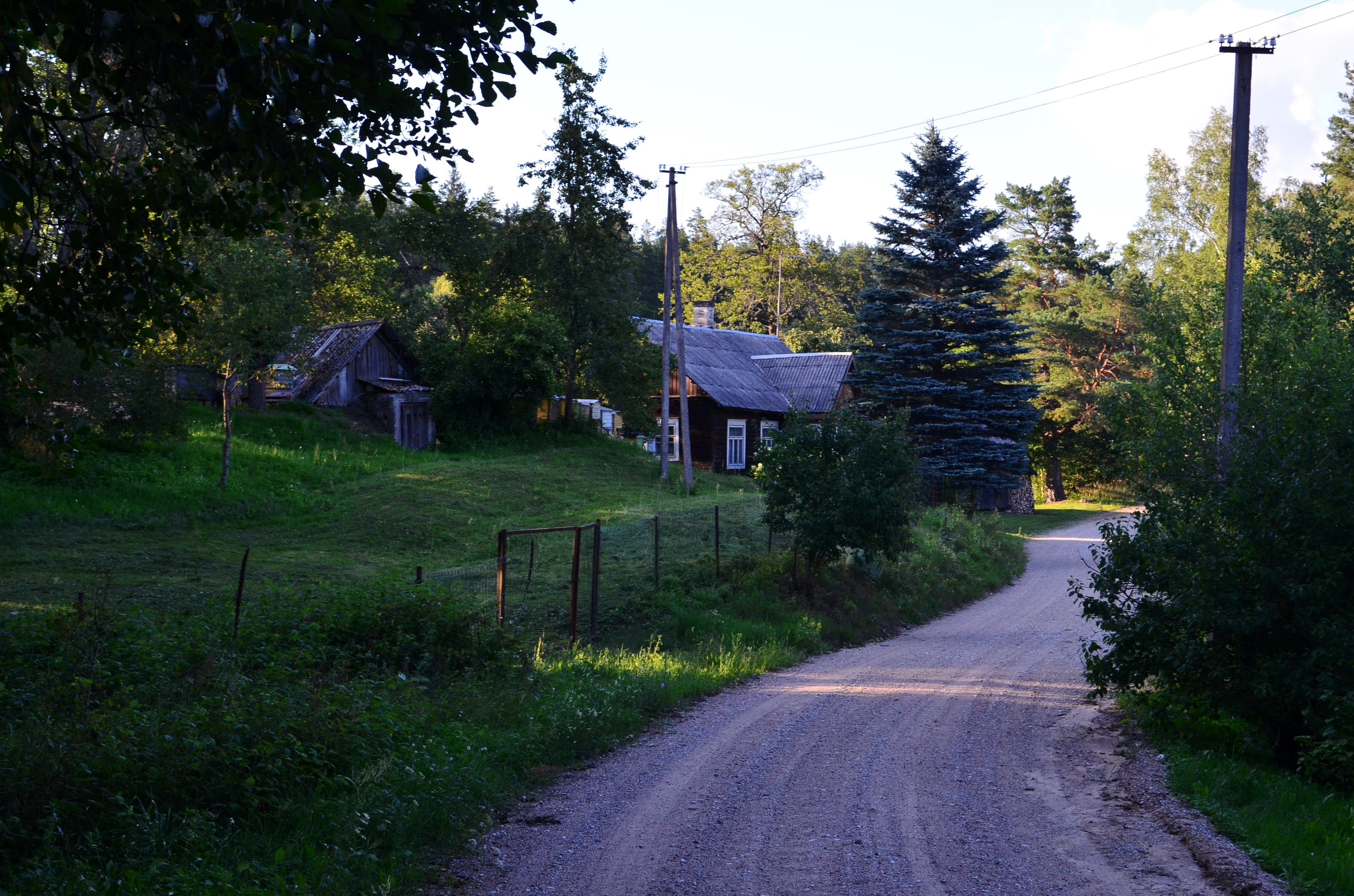 Terpežio k., Kaltanėnų sen., Švenčionių raj.